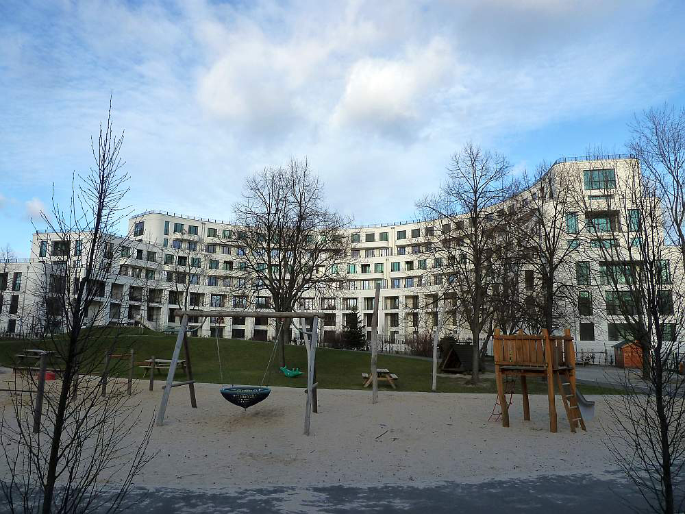 Die Wohnanlage "Prenzlauer Bogen" im Berliner Thälmannpark (Prenzlauer Berg)